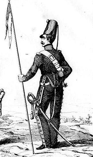 Éclaireur-dragon de la Garde impériale.